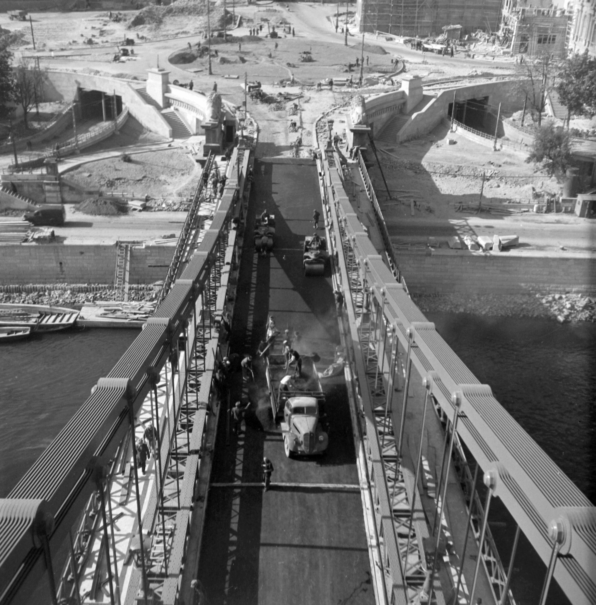 Lánchíd az újjáépítéskor. Szemben a Clark Ádám tér és az Alagút. Location: Hungary, Budapest I. Tags: bridge building, construction, Budapest Title: Lánchíd az újjáépítéskor. Szemben a Clark Ádám tér és az Alagút.